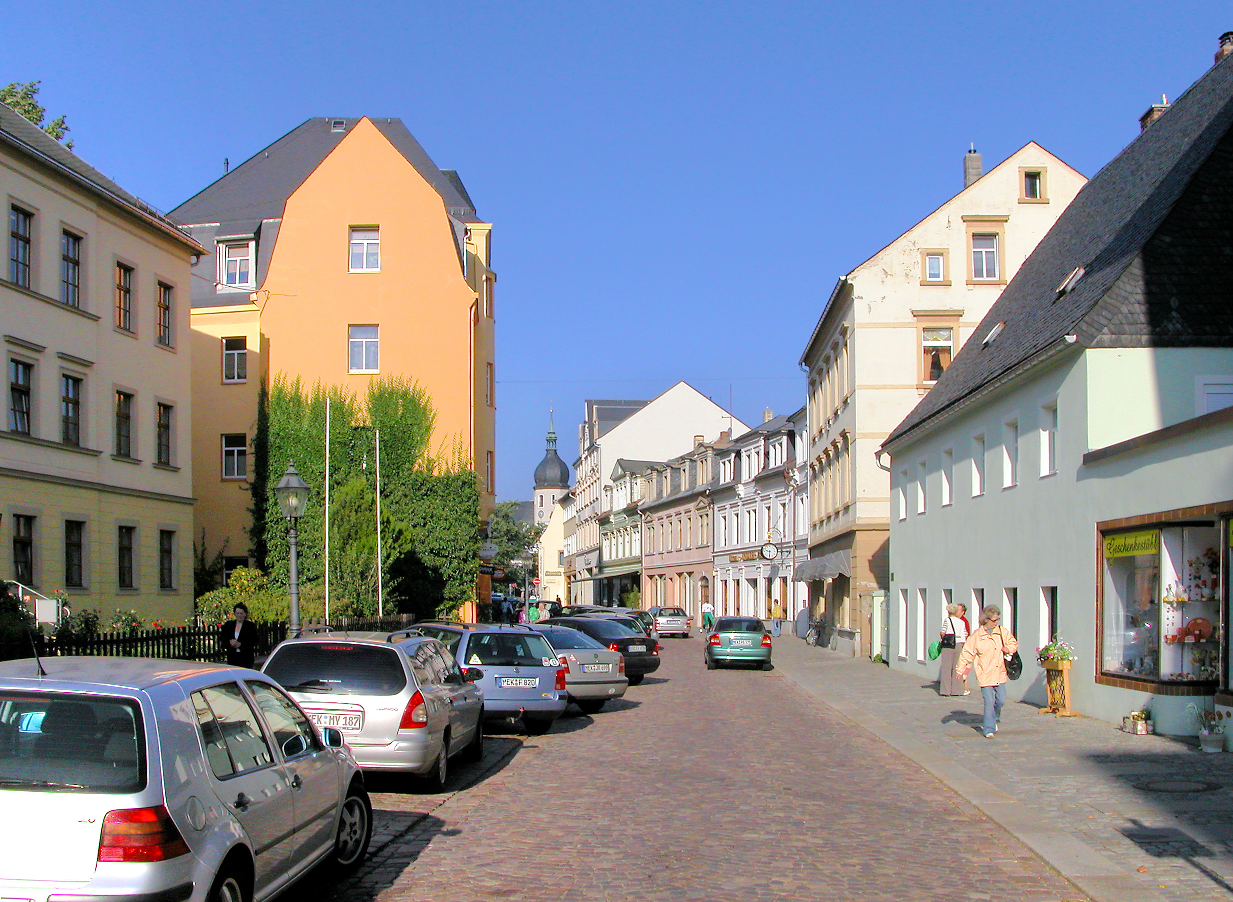 25.09.2006 09526 Olbernhau: Einkaufsmeile Grünthaler Straße. Links im Schatten die alte Bürgerschule von 1886 (GMP: 50.660427,13.337969) mit später vielfach wechselnden Nutzungen. Heute Musikschule Mittlerer Erzgebirgskreis. Der gelbe Giebel links ist die Nr. 12. Rechts das zweigeschossige Haus mit dem Flachbau ist der Kunstgewerbeladen Brunner. Danach folgt das hohe Haus mit dem Lebensmittelladen, dann Ender - Uhren und Schmuck (Haus Nr. 11). Der Druchblick reicht bis zum Giebel des früheren 'Haus der Dame' (heute Sparkasse) und der Stadtkirche am Markt. [DSCN11753.TIF]20060925060DR.JPG(c)Blobelt